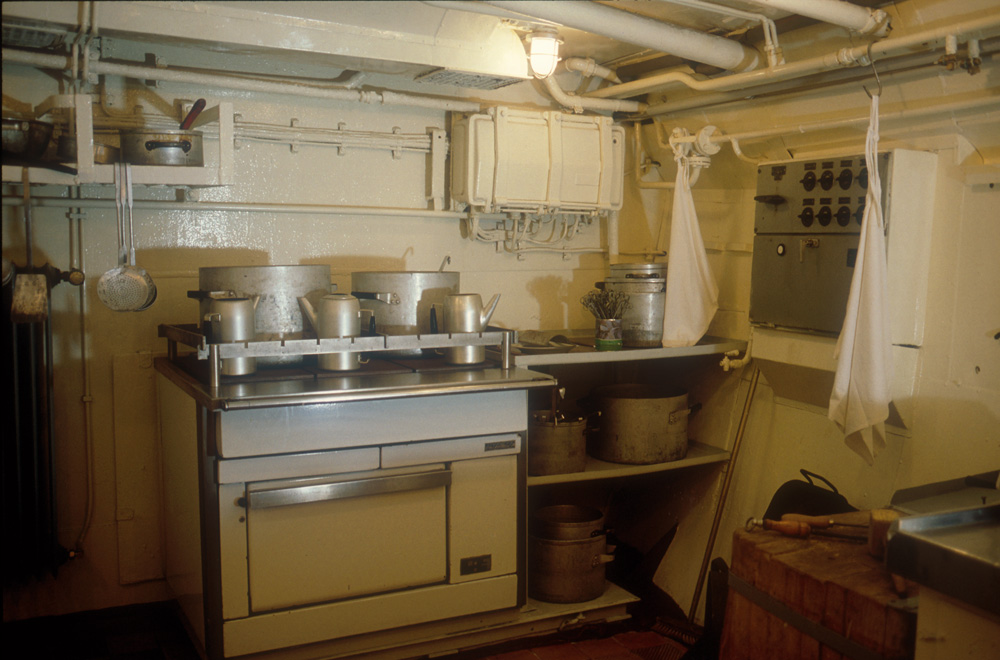 Blick in die Kombüse